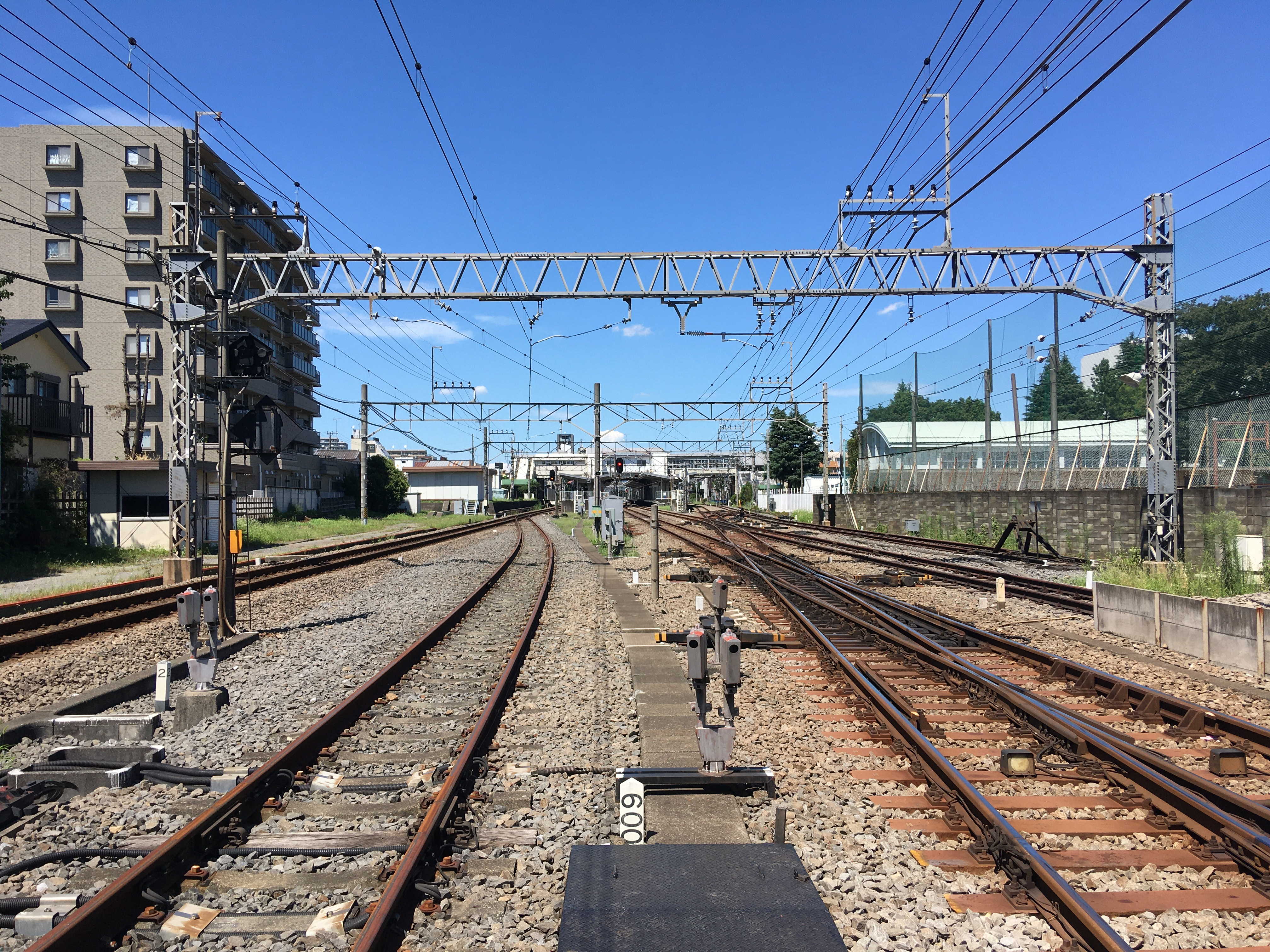 拝島方の踏切構内より撮影